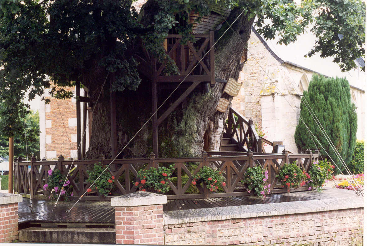 Kapel-eik van Allouville Bellefosse, Normanië, Frankrijk